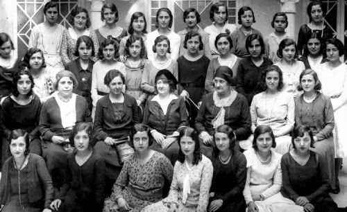 Maestras en la España de los años 1920-1930